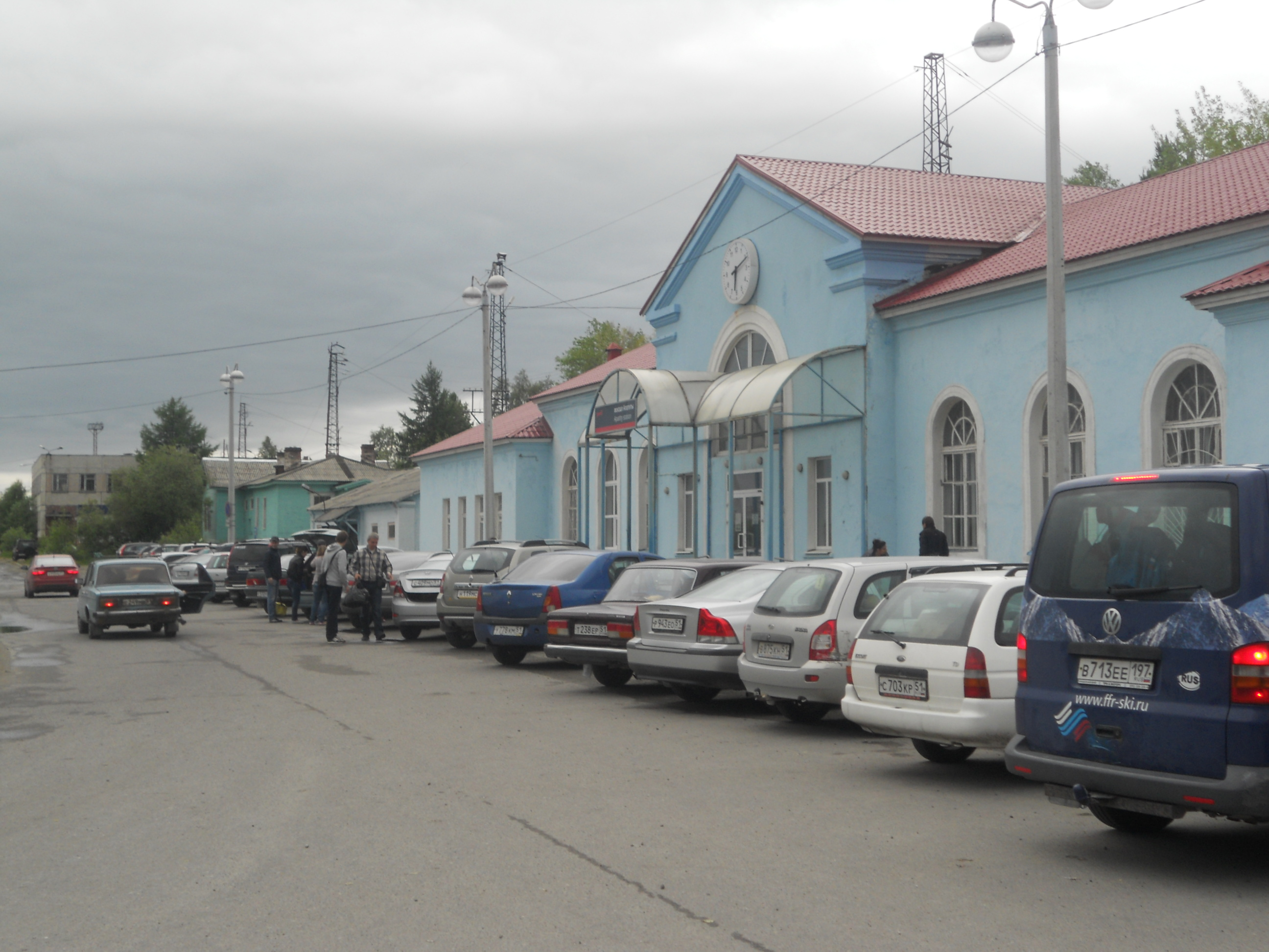 Вокзал в городе Апатиты